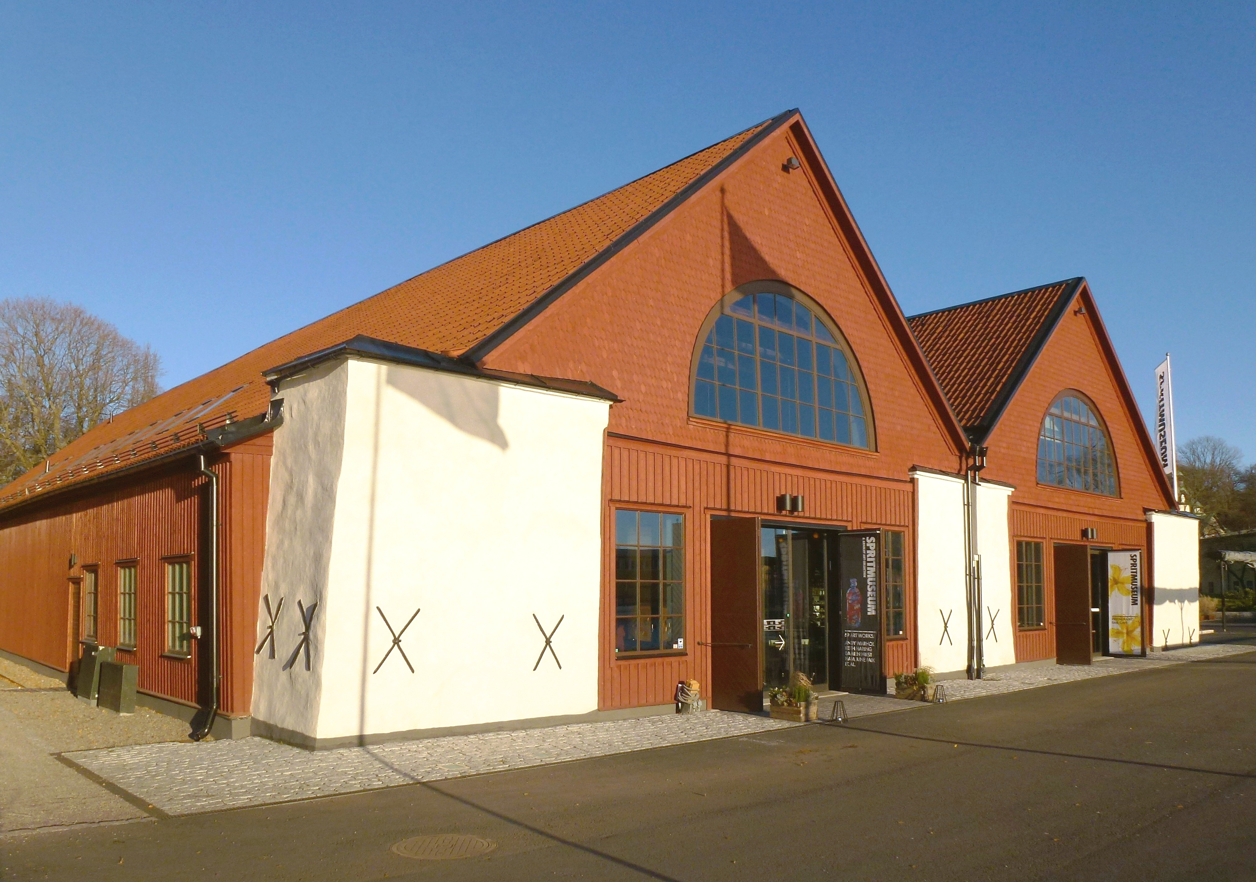 Spritmuseum i Stockholm